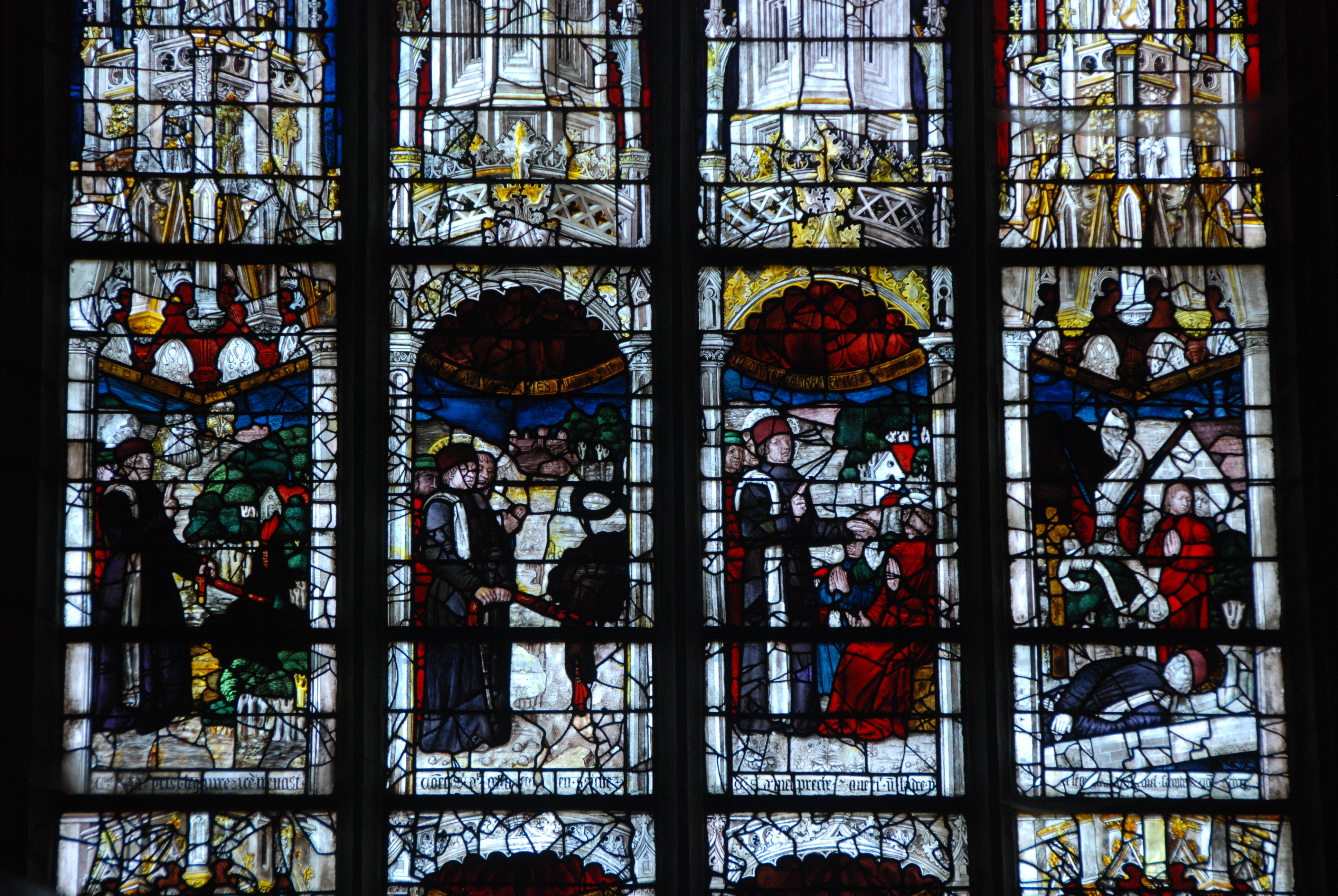 Vitrail sur la vie de Saint-Armel (XVème) - MH